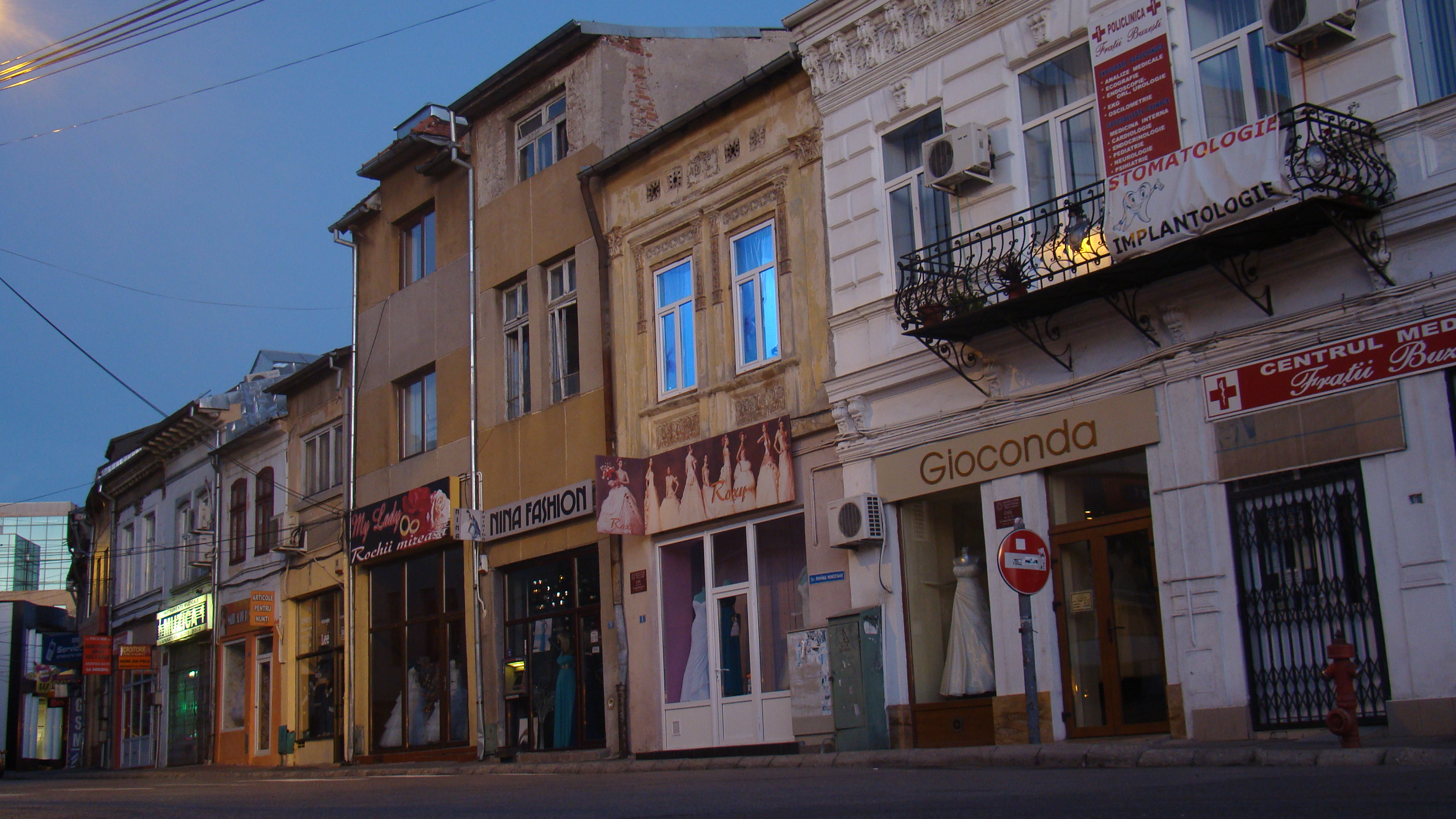 Casă Romania Muncitoare nr 8